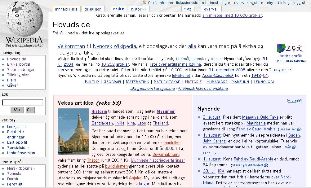 «Fotomontasje» laga av meg sjølv. Til bruk for promotering og anna.